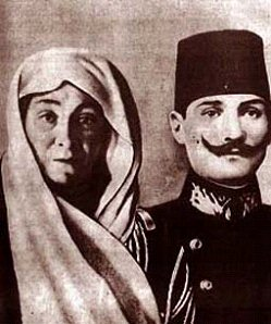 Zübeyde Hanım mère de Mustafa Kemal Atatürk. Photo prise sur le wiki US